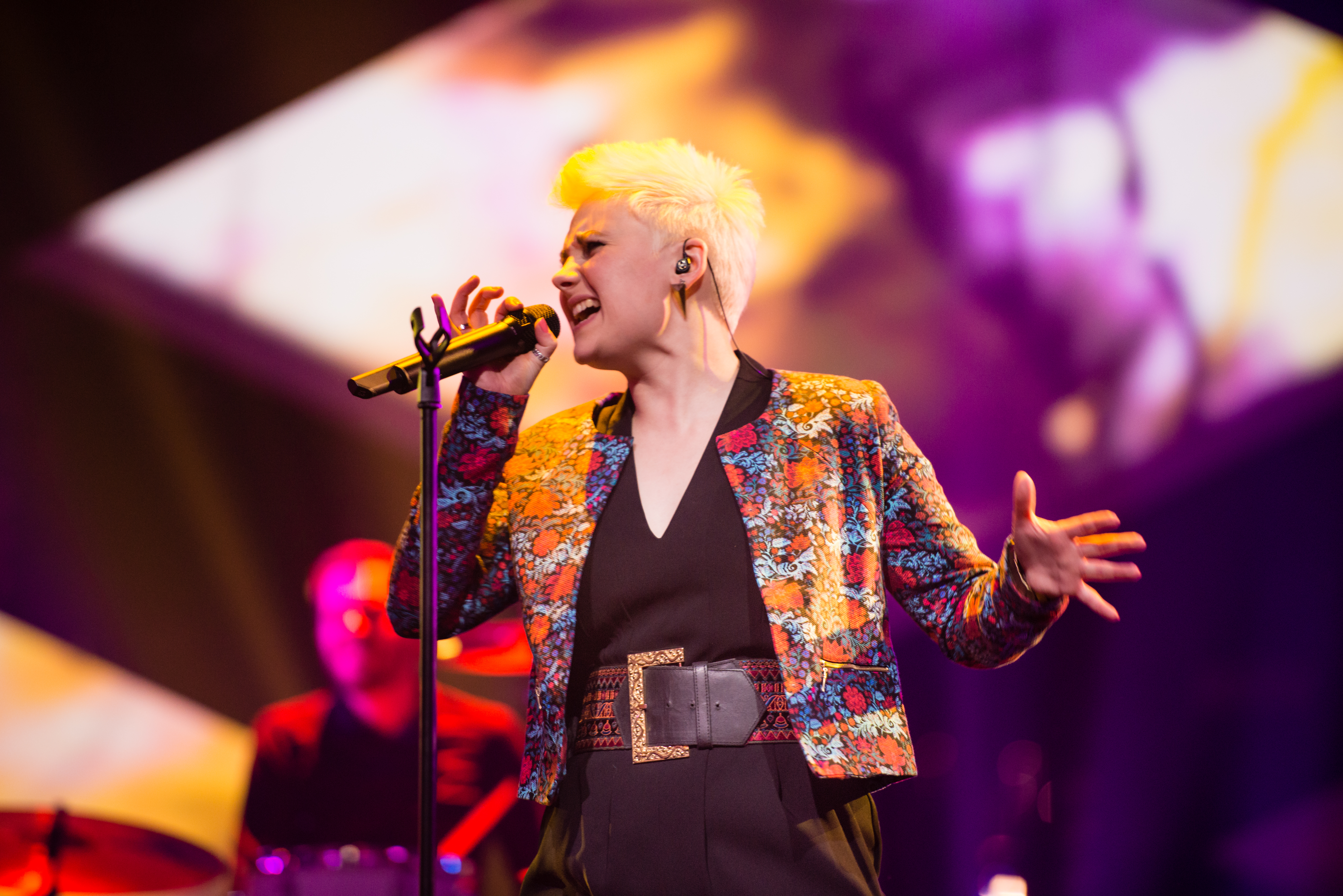 'Eurovision Song Contest 2014 - Unser Song für Dänemark': 'Elaiza'